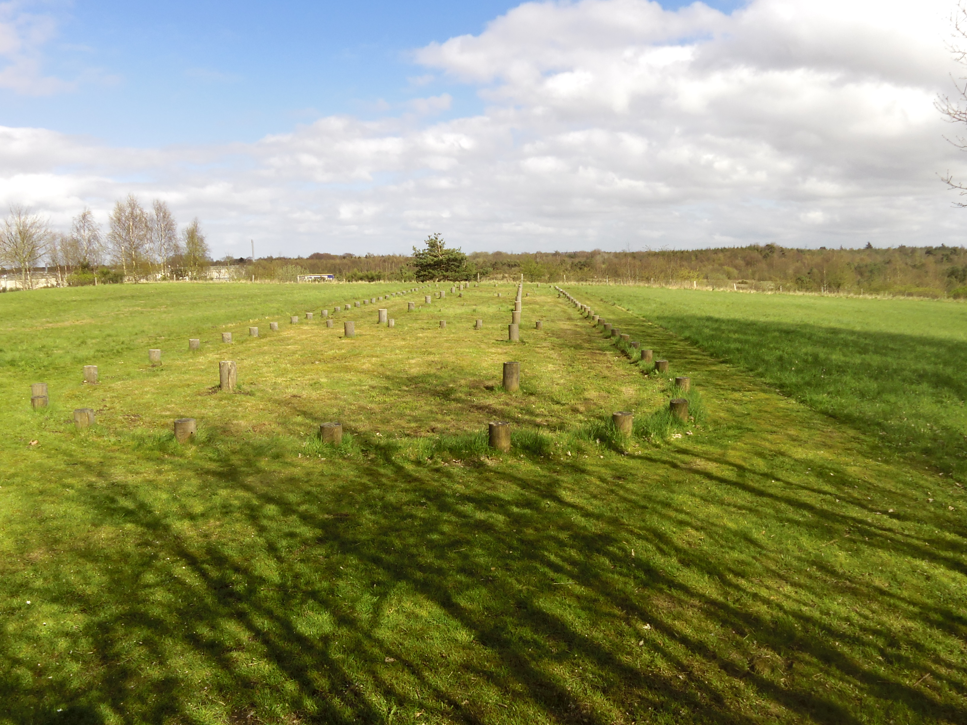 Rester af 500 m2 stort "3-skibet" langhus opført ca 1440 f.Kr.